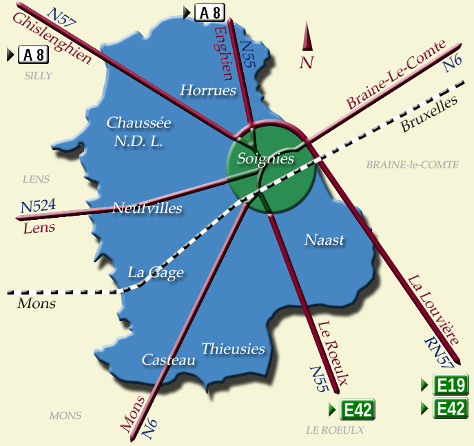 Soignies réseau routier